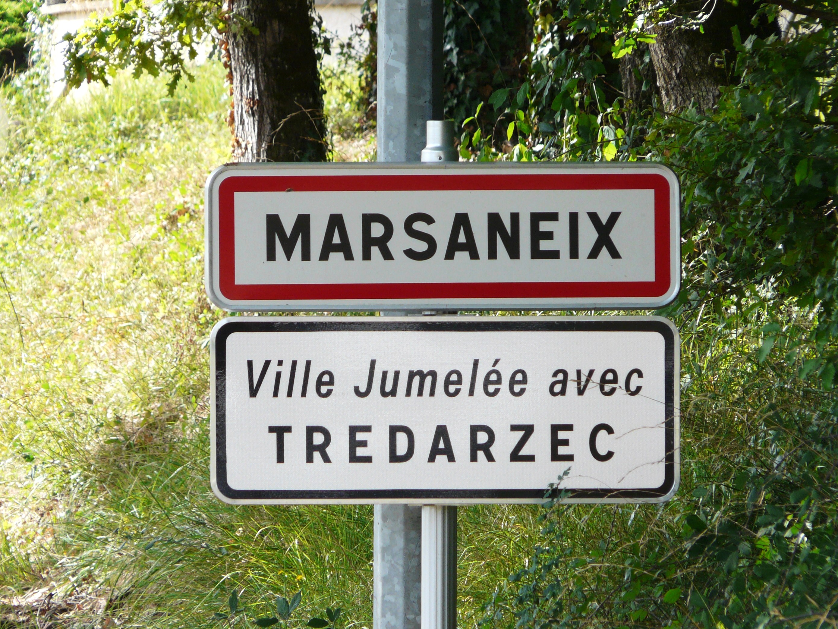 Panneau de jumelage de Marsaneix, Dordogne, France.